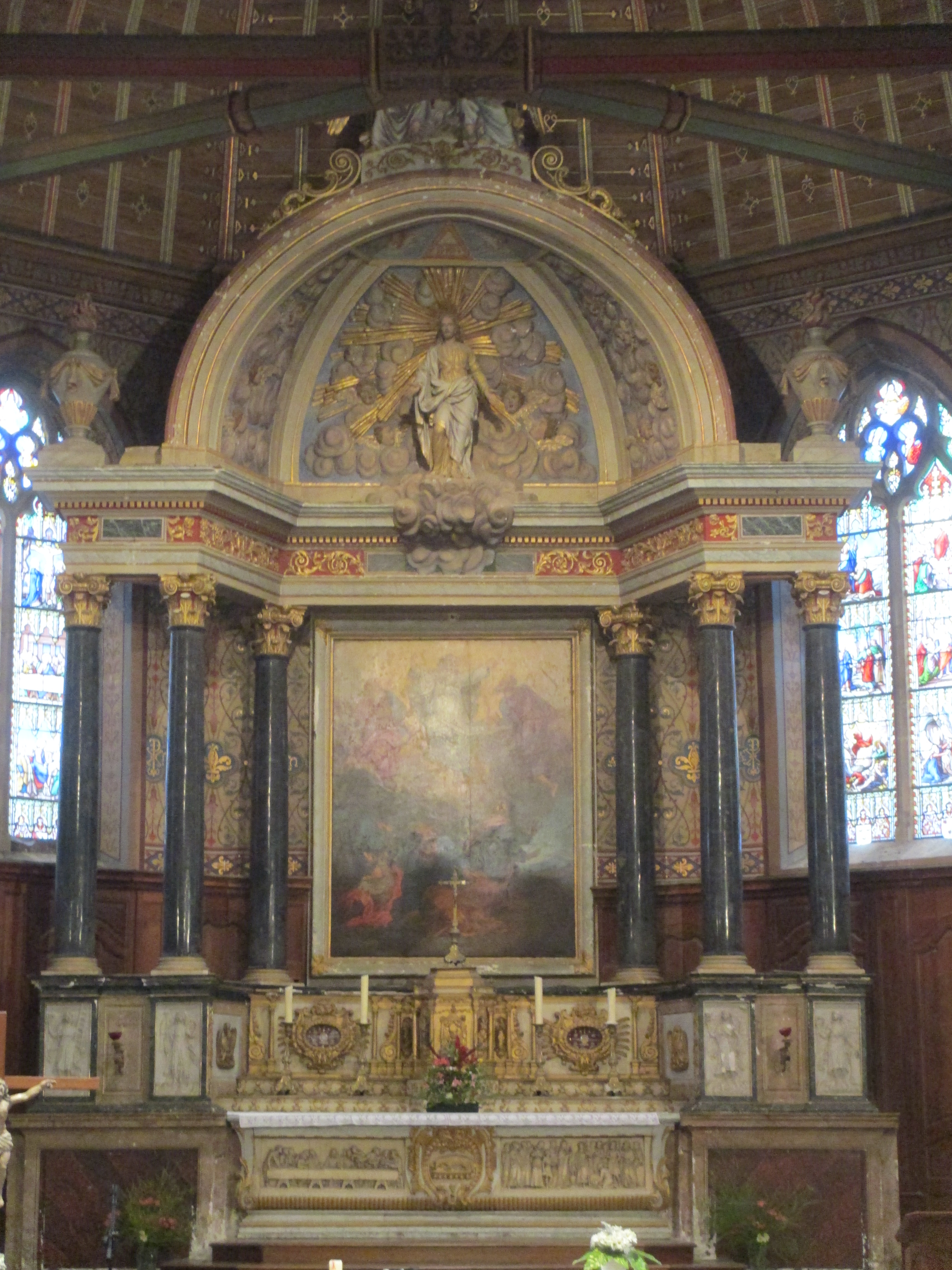 Maître-autel de l'église Saint-Sauveur de Bellême.